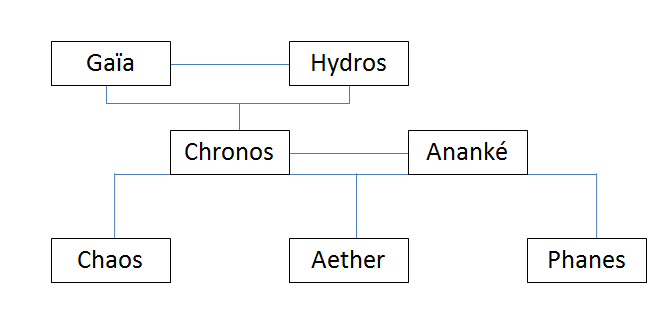 Arbre simplifié du dieu Chronos, personnification du temps